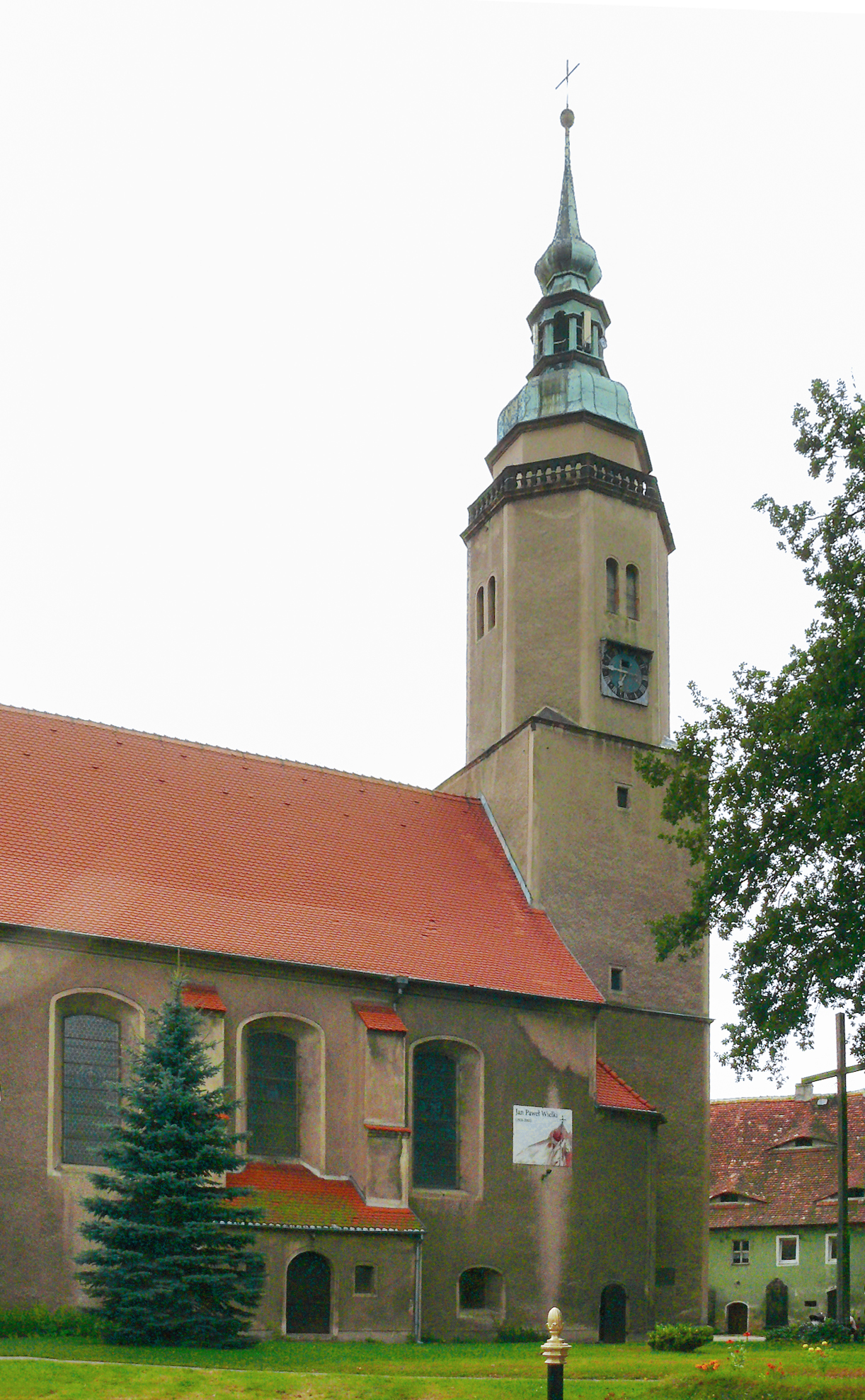 Sulików, ul. Kościelna - kościół parafialny Podwyższenia Krzyża Świętego (zabytek nr rejestr. 1501 z 25.01.1966)